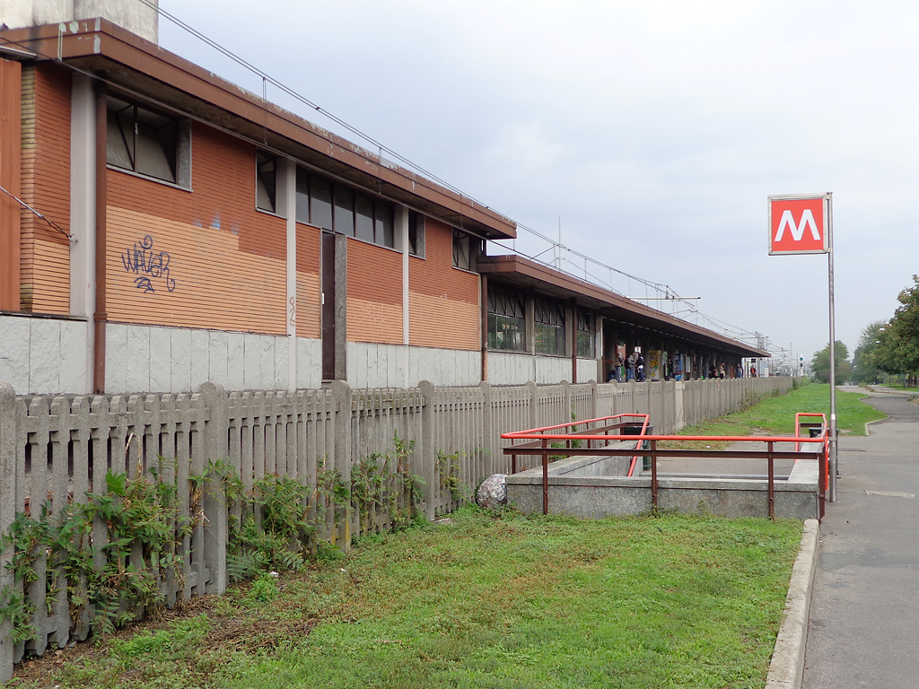 Stazione di Crescenzago della metropolitana di Milano, scala d'ingresso dal lato est.